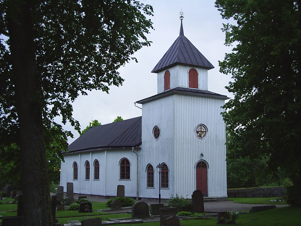 Väne Ryrs kyrka, byggd 1732. Fotograf:Tubaist